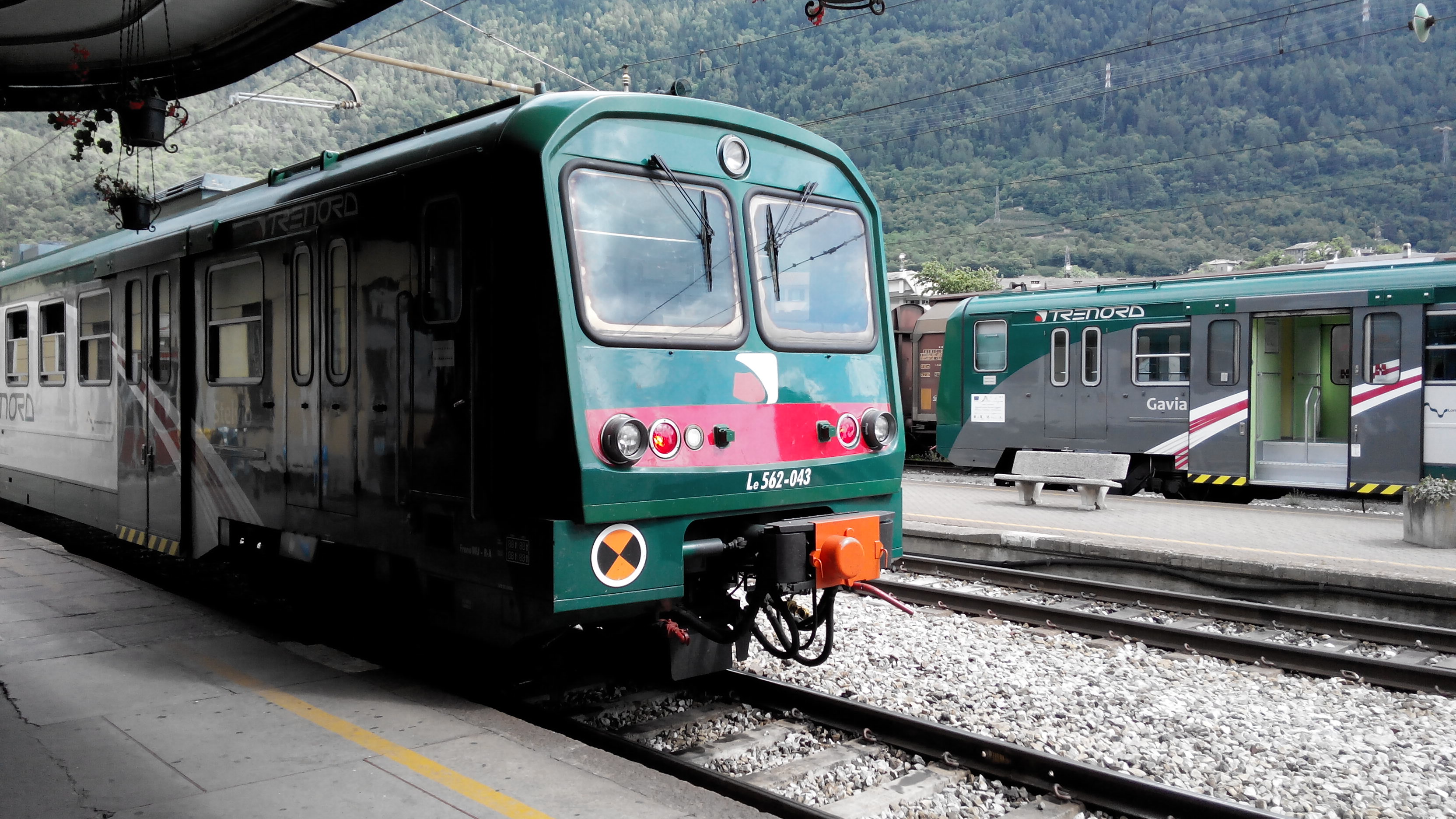 Carrozza rimorchiata semipilota Le 562.043 in livrea Trenord, in sosta a Tirano. In secondo piano un'altra Le 562